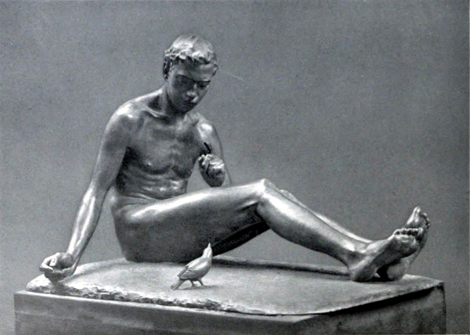 Der Vogler